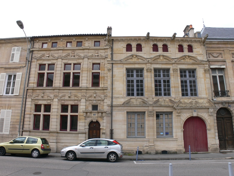 Façades Renaissance, rue du Bourg à Bar-le-Duc, Lorraine, France